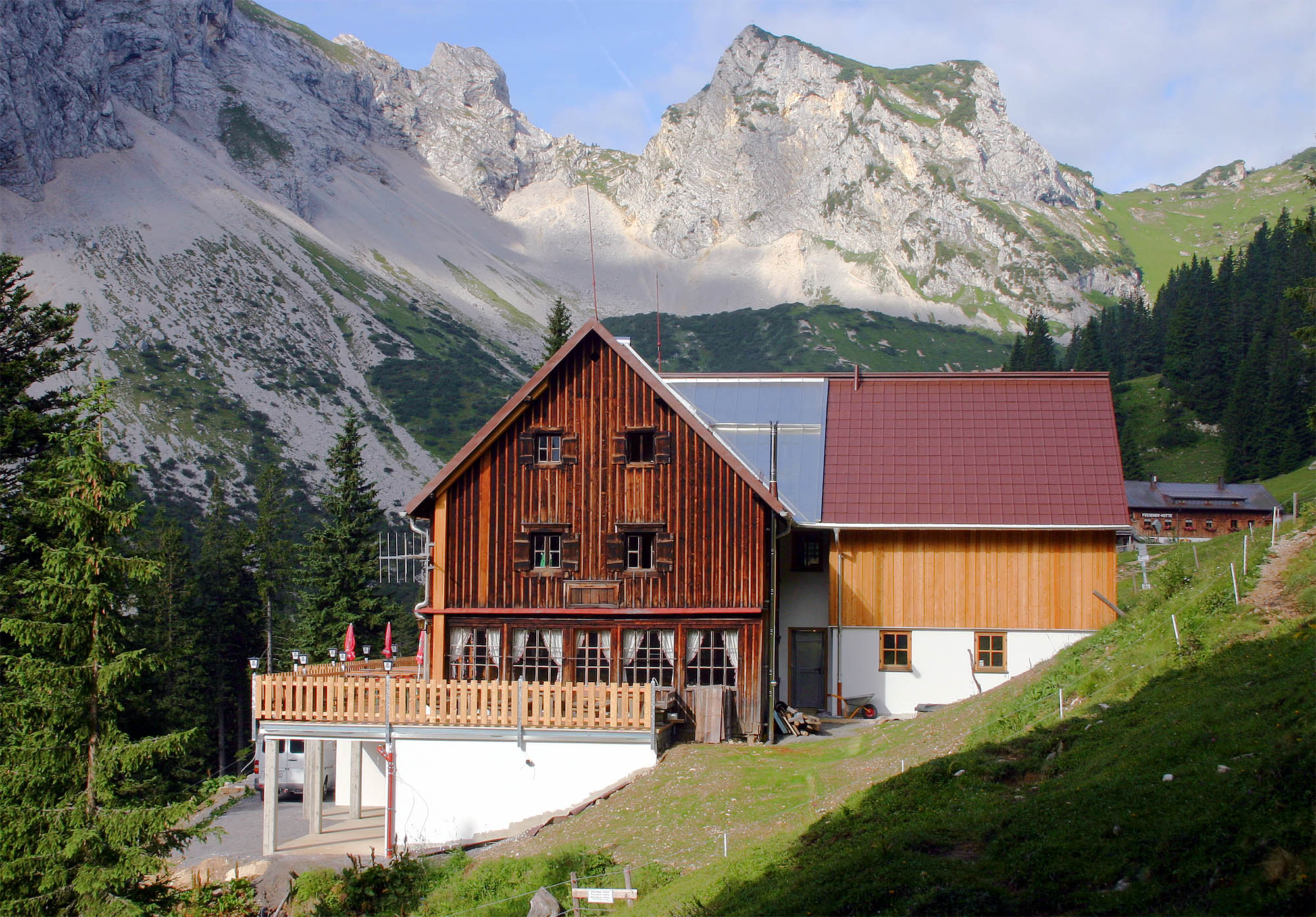 Otto-Mayr-Hütte in den Tannheimer Bergen, von Osten mit dem Schartschrofen (1968 m) im Hintergrund. Rechts hinter der Hütte die benachbarte Füssener Hütte.